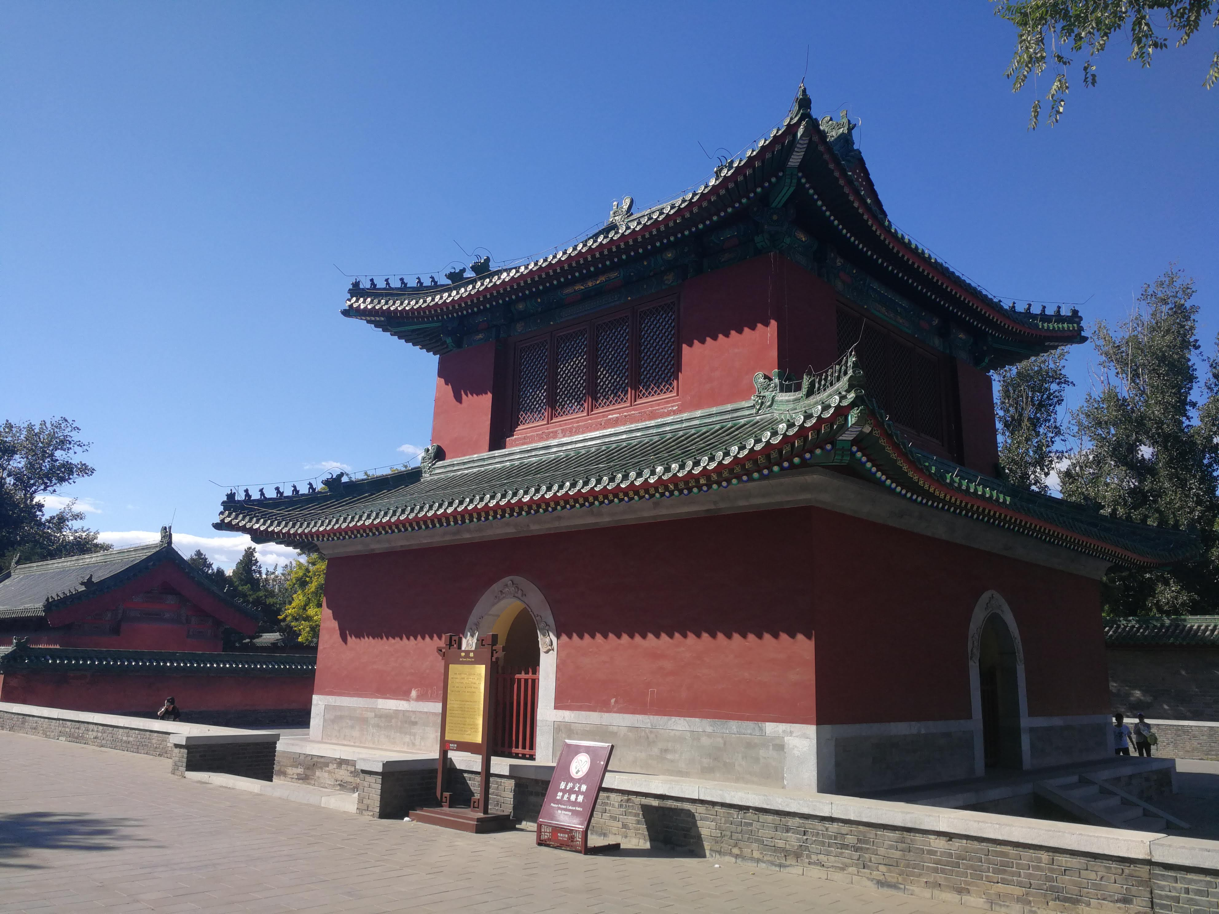 Drum Tower, Ditan of Beijing